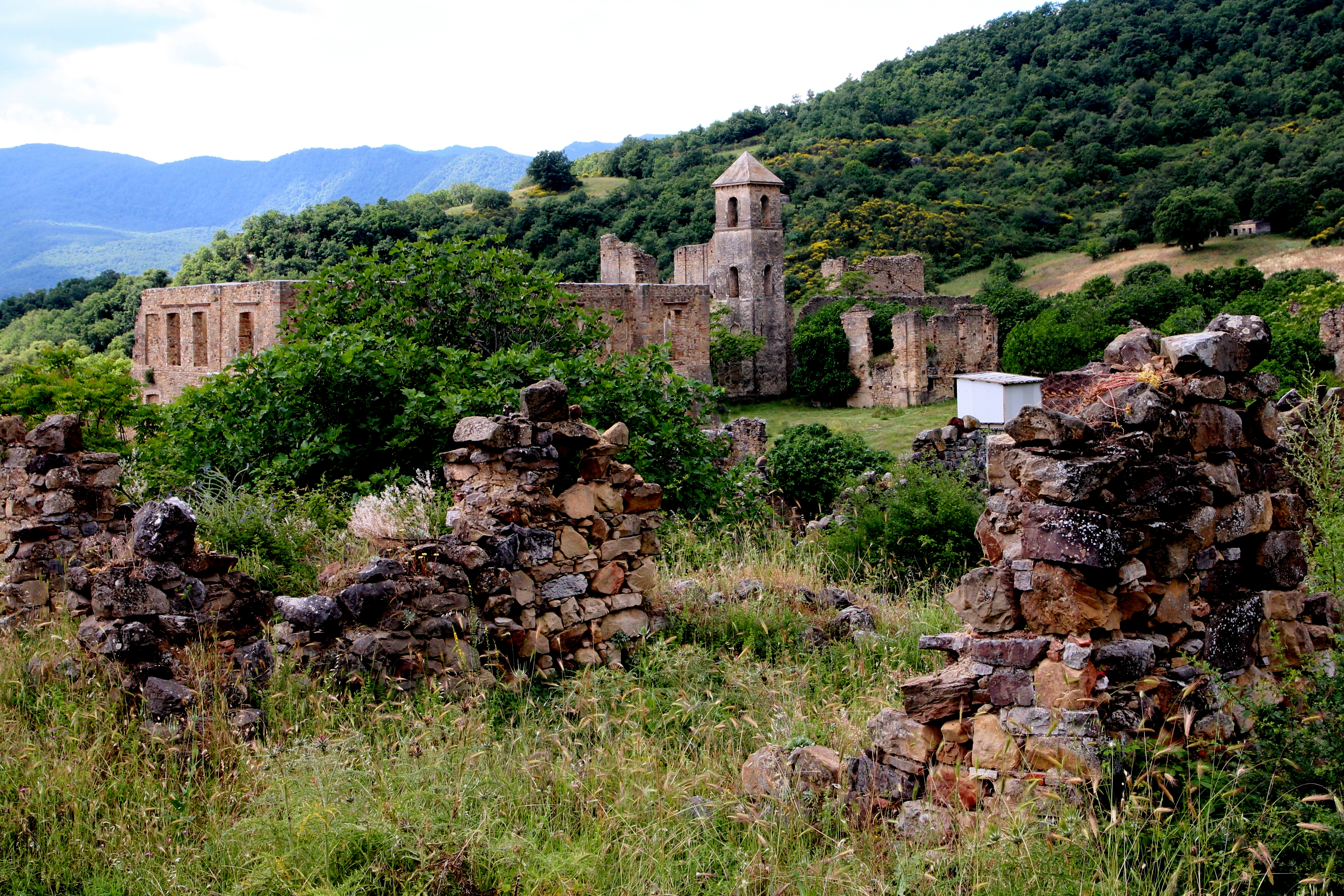 Chiesa di Campomaggiore vecchio con il Palazzo Baronale This is a photo of a monument which is part of cultural heritage of Italy.